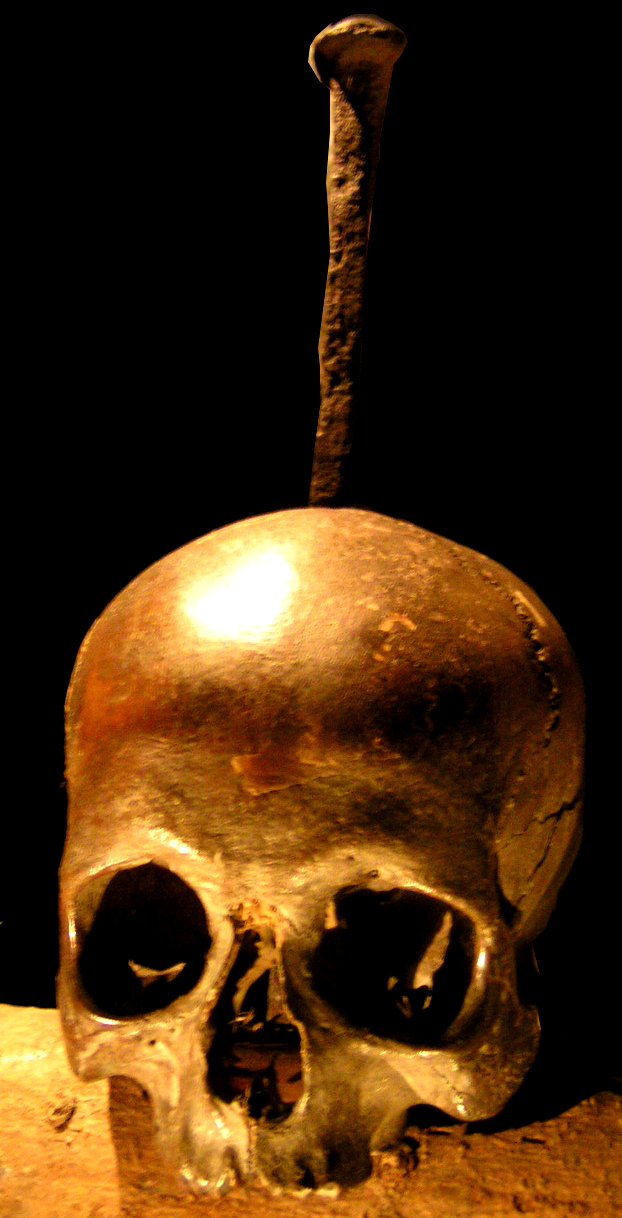 Schaedel, Störtebeker?, Hanse